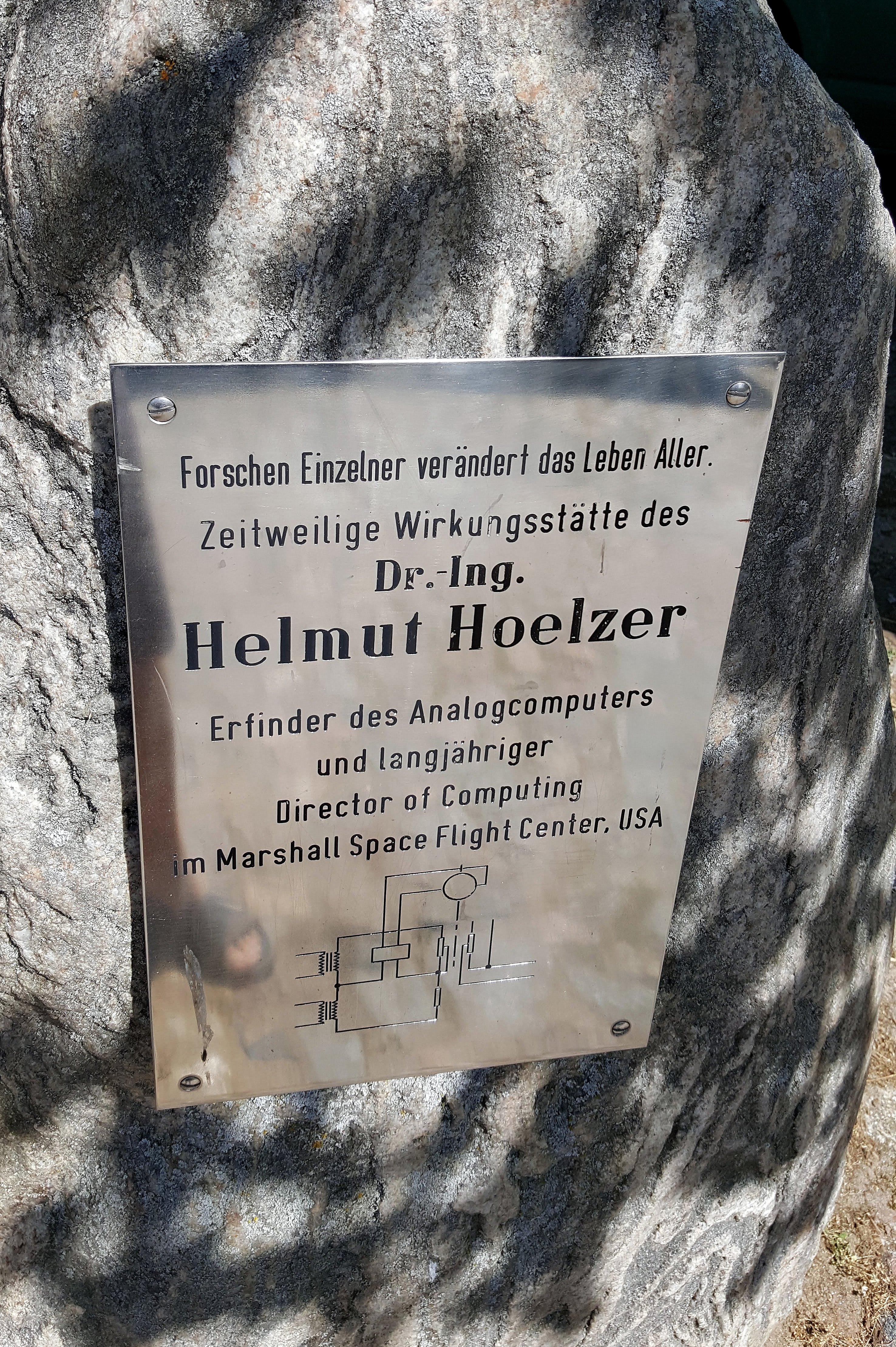 Gedenktafel für Helmut Hoelzer an seiner ehem. Wirkungsstätte Forstamt Neu Pudagla